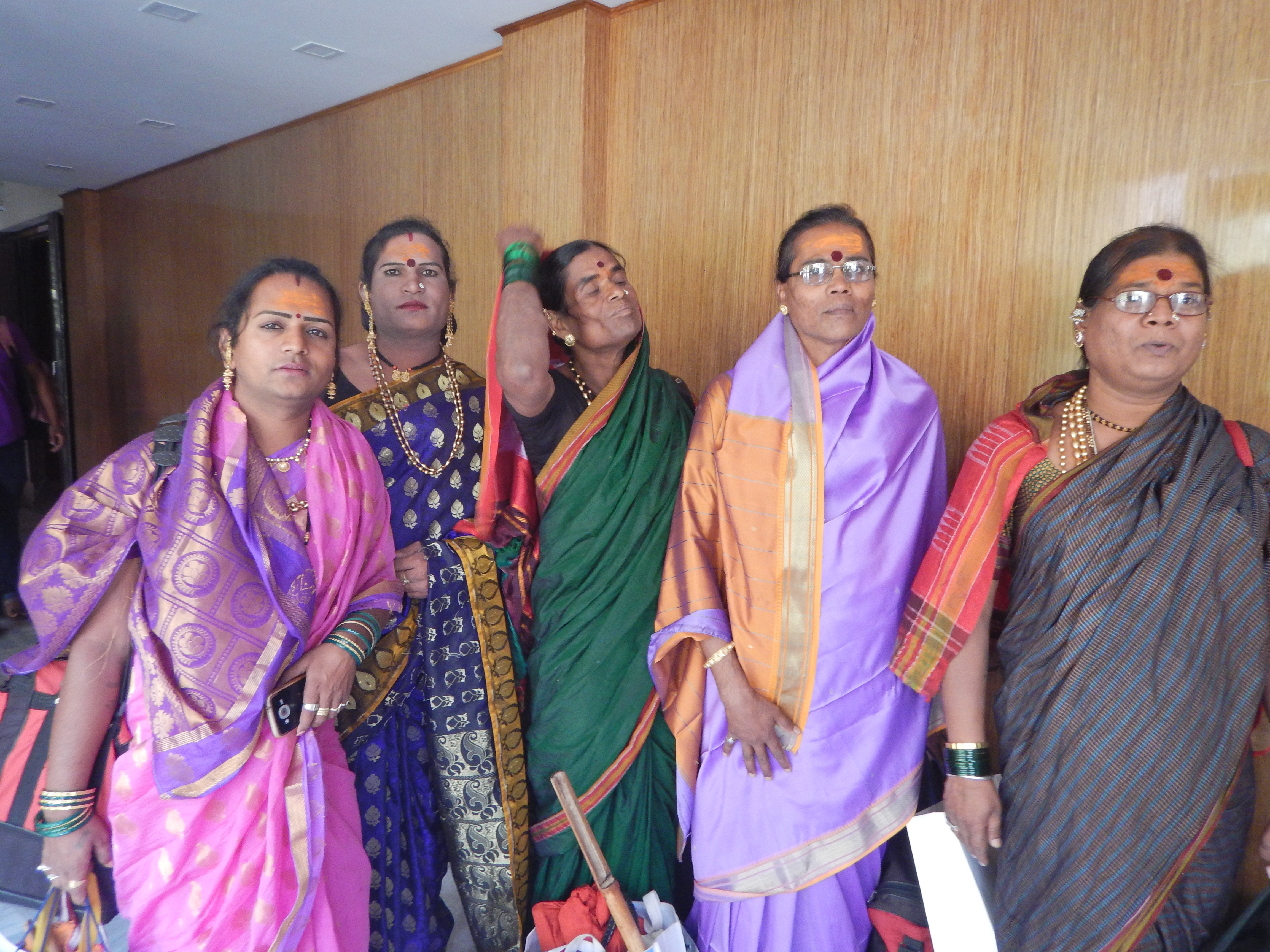 Jogappa is small transgender community in Northern Karnataka, Andhra Pradesh and Maharashtra. They are traditional folk singers and dancers.